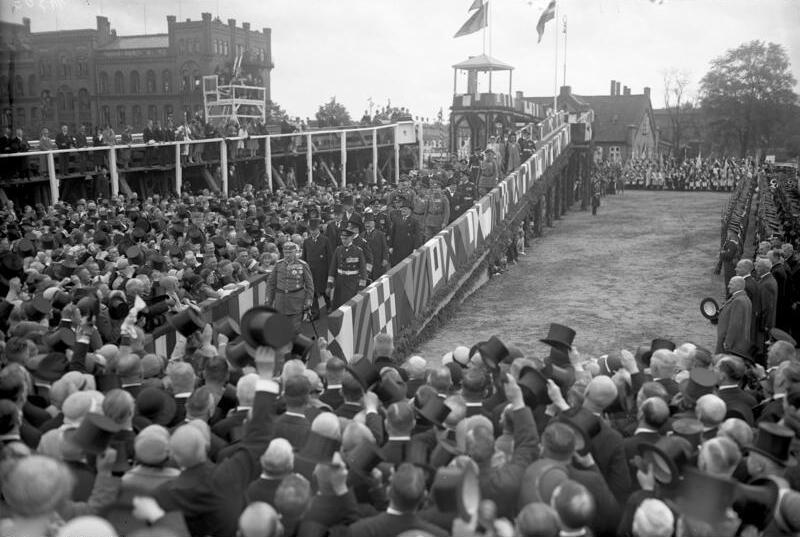 Der Panzerkreuzer "A" wurde vom Reichspräsidenten von Hindenburg auf den Namen "Deutschland" auf der Germania-Werft in Kiel getauft. Reichspräsident von Hindenburg in Feldmarschallsuniform, daneben Reichswehrminister Dr. Groener, werden nach Verlassen der Taufkanzel von einer riesigen Menschenmenge stürmisch begrüsst.